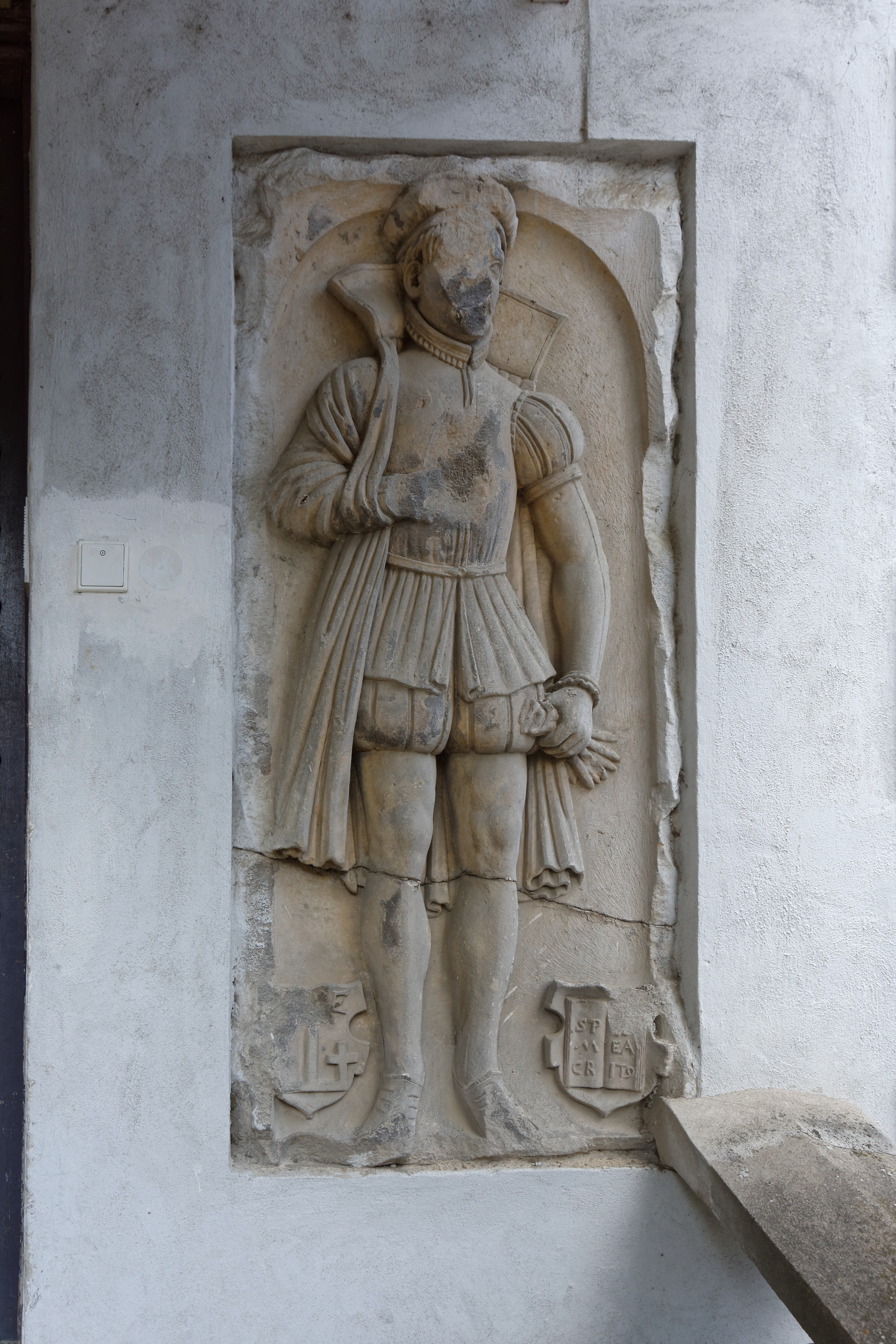 Sochova vila, Husova 805/20, Litovel.